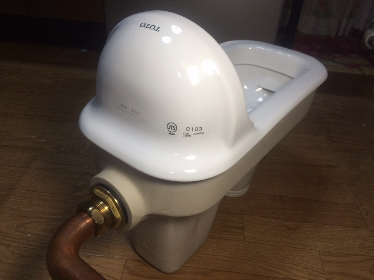 C75銅管使用